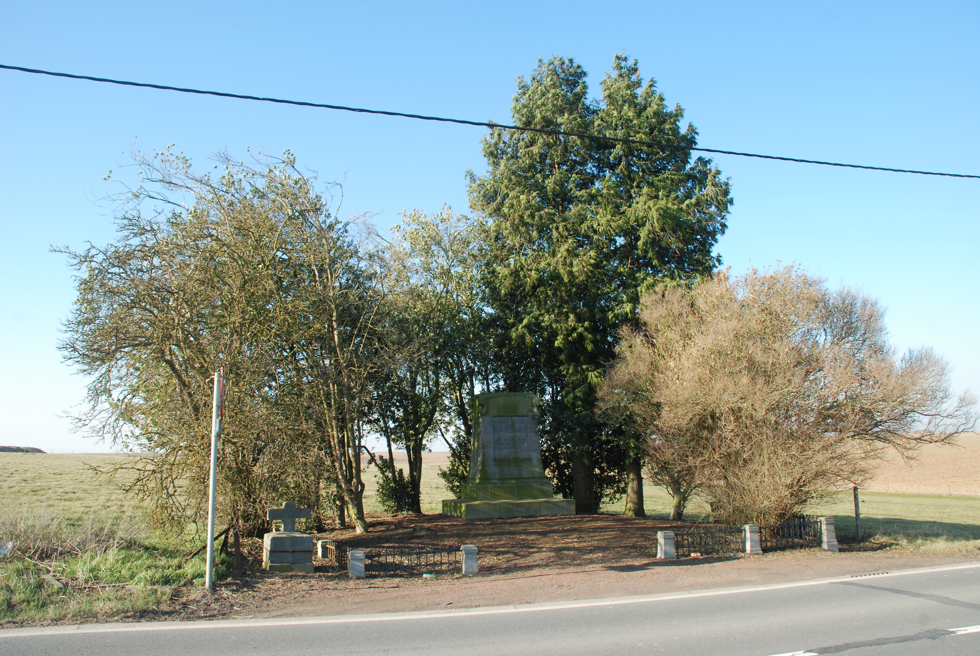 Belgique - Brabant wallon - Genappe - Monument aux Belges (Quatre Bras)